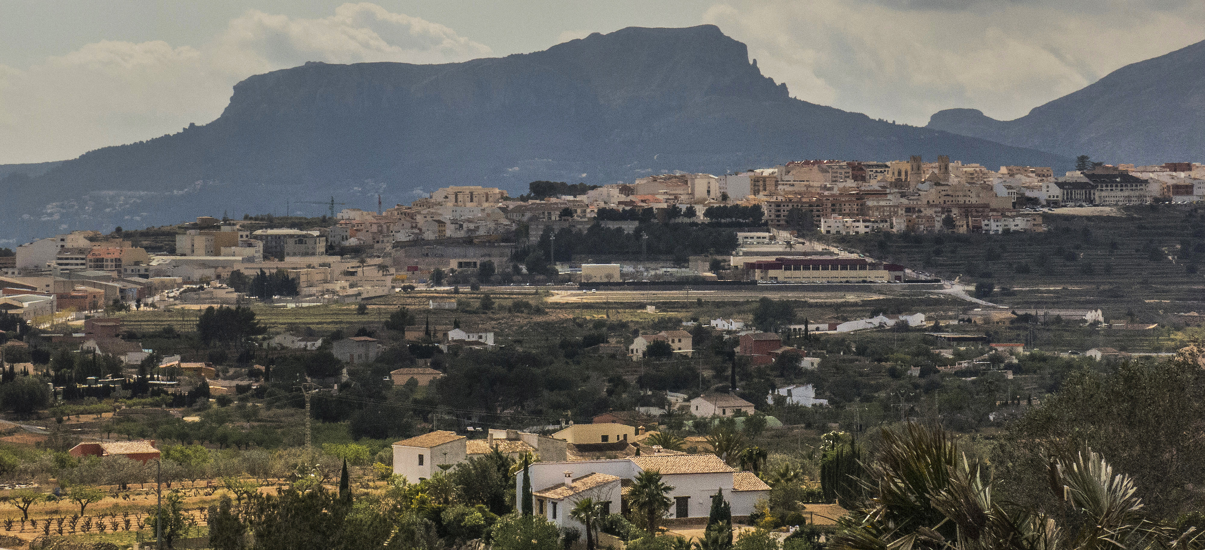 Panoràmica de Benissa -Marina Alta-. Foto feta des de la Vallada Verda.